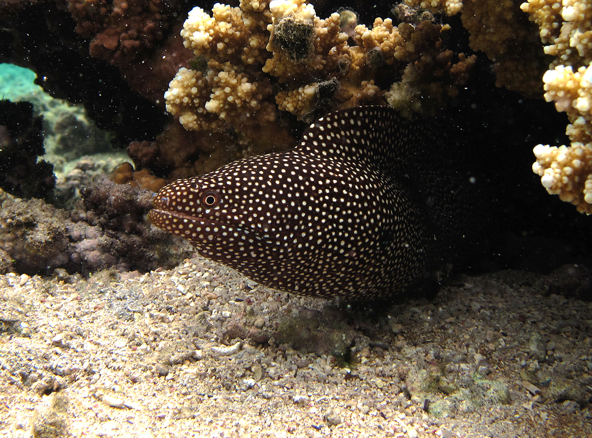 Une murène ponctuée (Gymnothorax meleagris) à la Réunion.